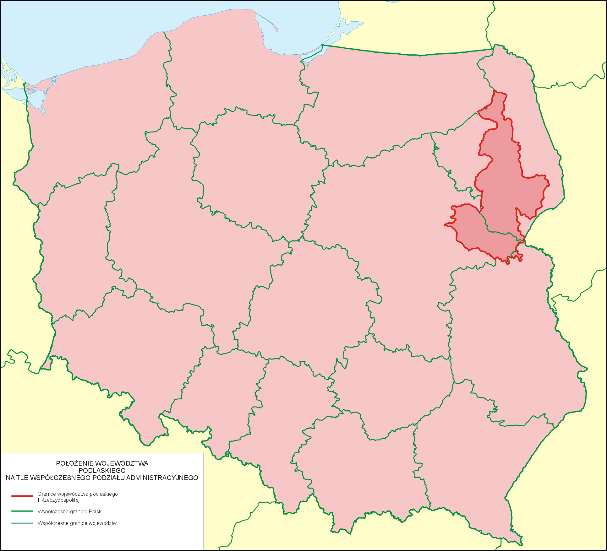 Położenie województwa podlaskiego I Rzeczypospolitej na tle współczesnego podziału administracyjnego